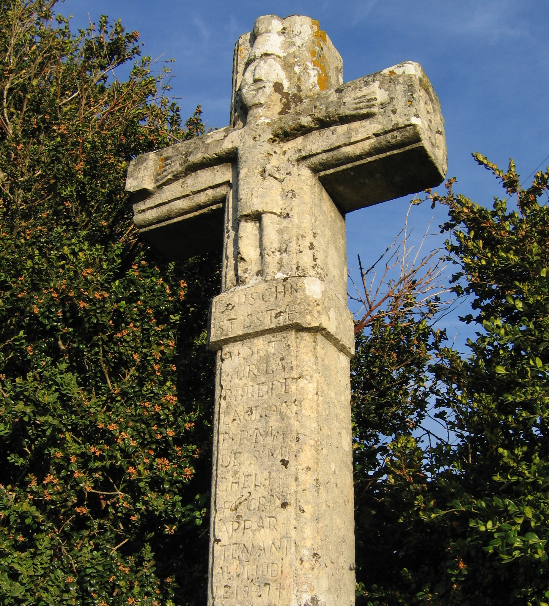 Description: Calvaire, Paroisse de Saint Michel d'Alajou, Causse du Larzac Hérault, France Source: Hugo Soria Licence: GFDL Hugo Soria